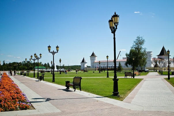 Тюменская область г. Тобольск